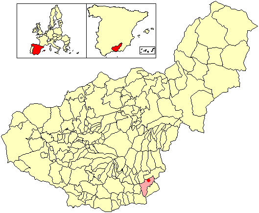 Situación de la localidad de Cojáyar (en el municipio de Murtas) respecto a la provincia de Granada, en España.